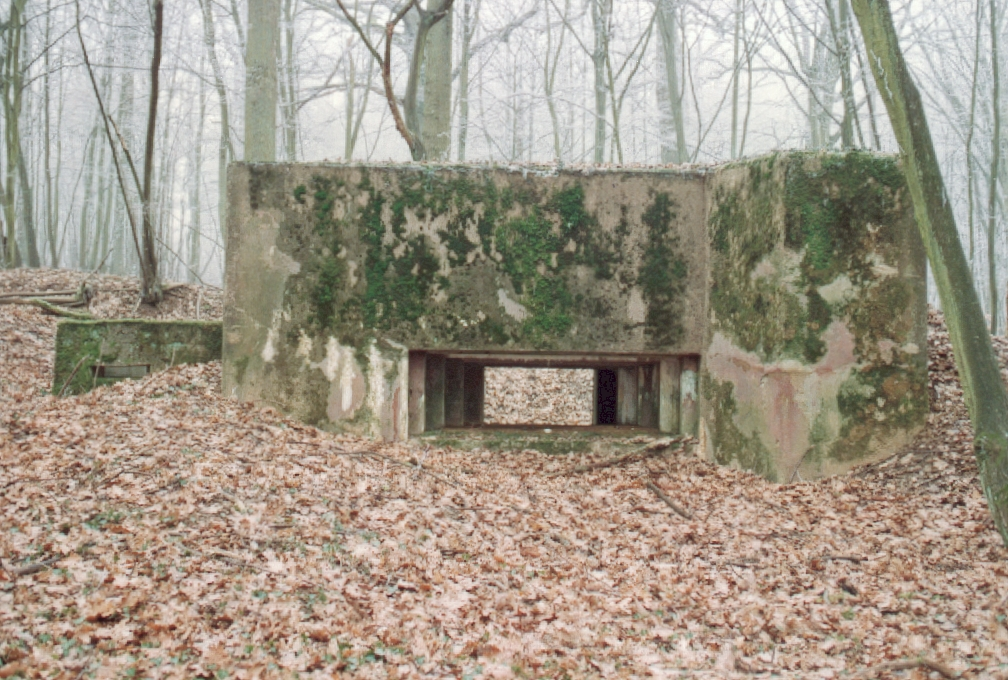 Kleinkampfanlage, Bois du Cattenom, Maginot-Linie